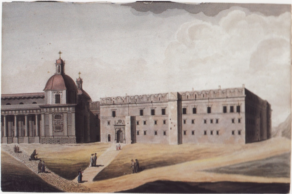 Беларуская (тарашкевіца): Вільня (Vilnia), Дольны замак (Dolny zamak) або палац вялікіх князёў літоўскіх